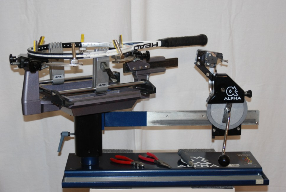 Une machine à corder à manivelle est un outil utilisé pour installer des cordes sur une raquette.